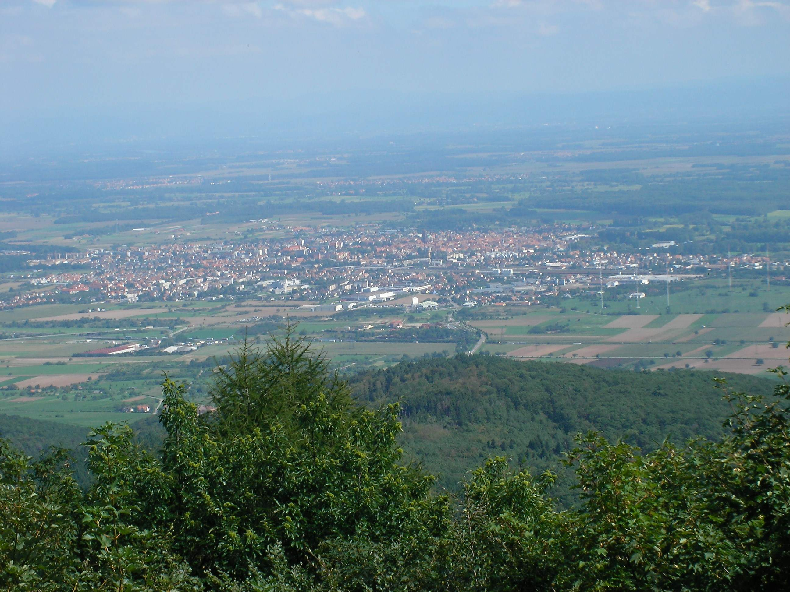 Vue de Sélestat depuis le château du Haut-Kœnigsbourg (755 m) à Orschwiller (Bas-Rhin, France).